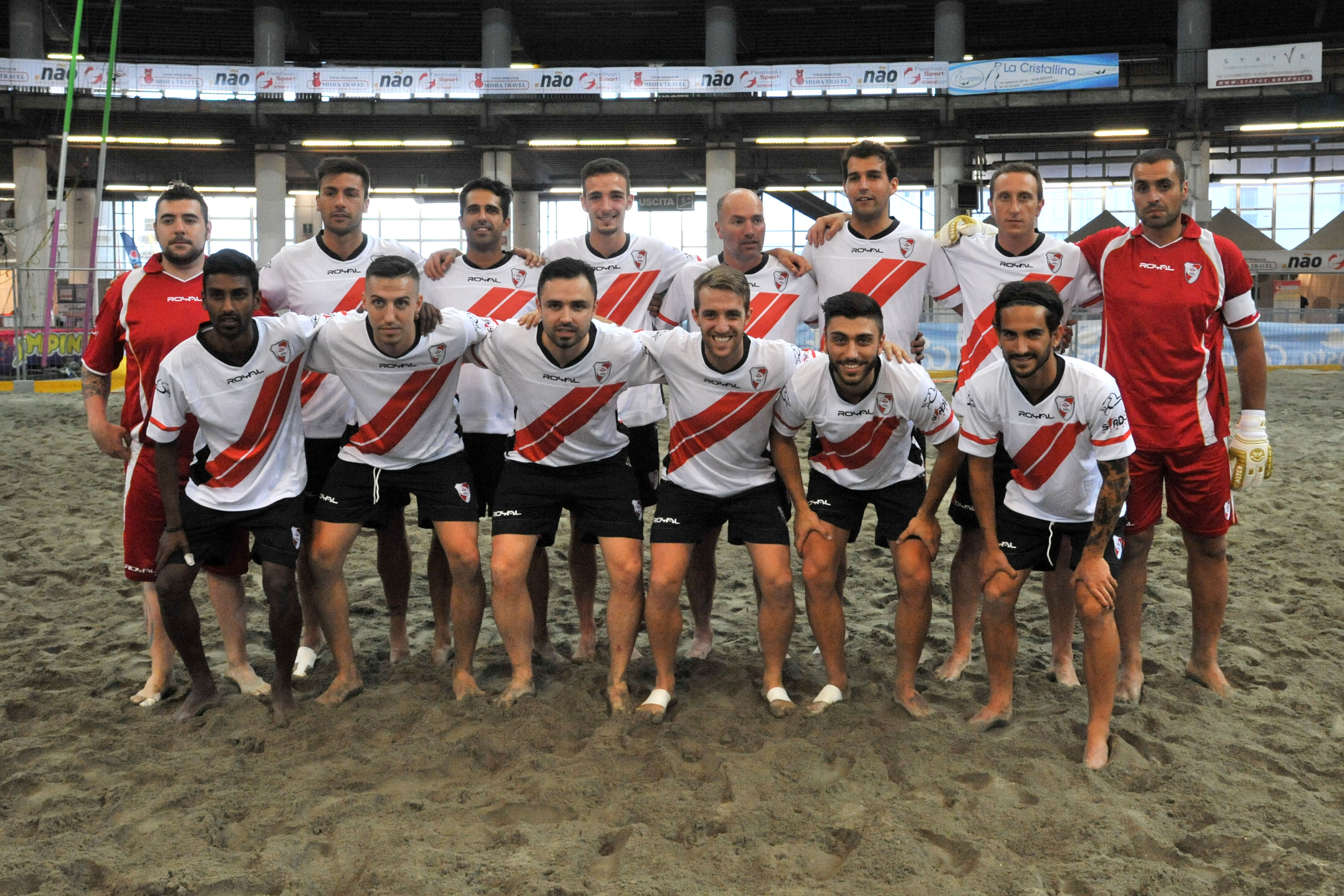 Una foto della Genova BS nell'estate 2014.